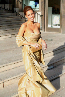 Jennifer Santiago